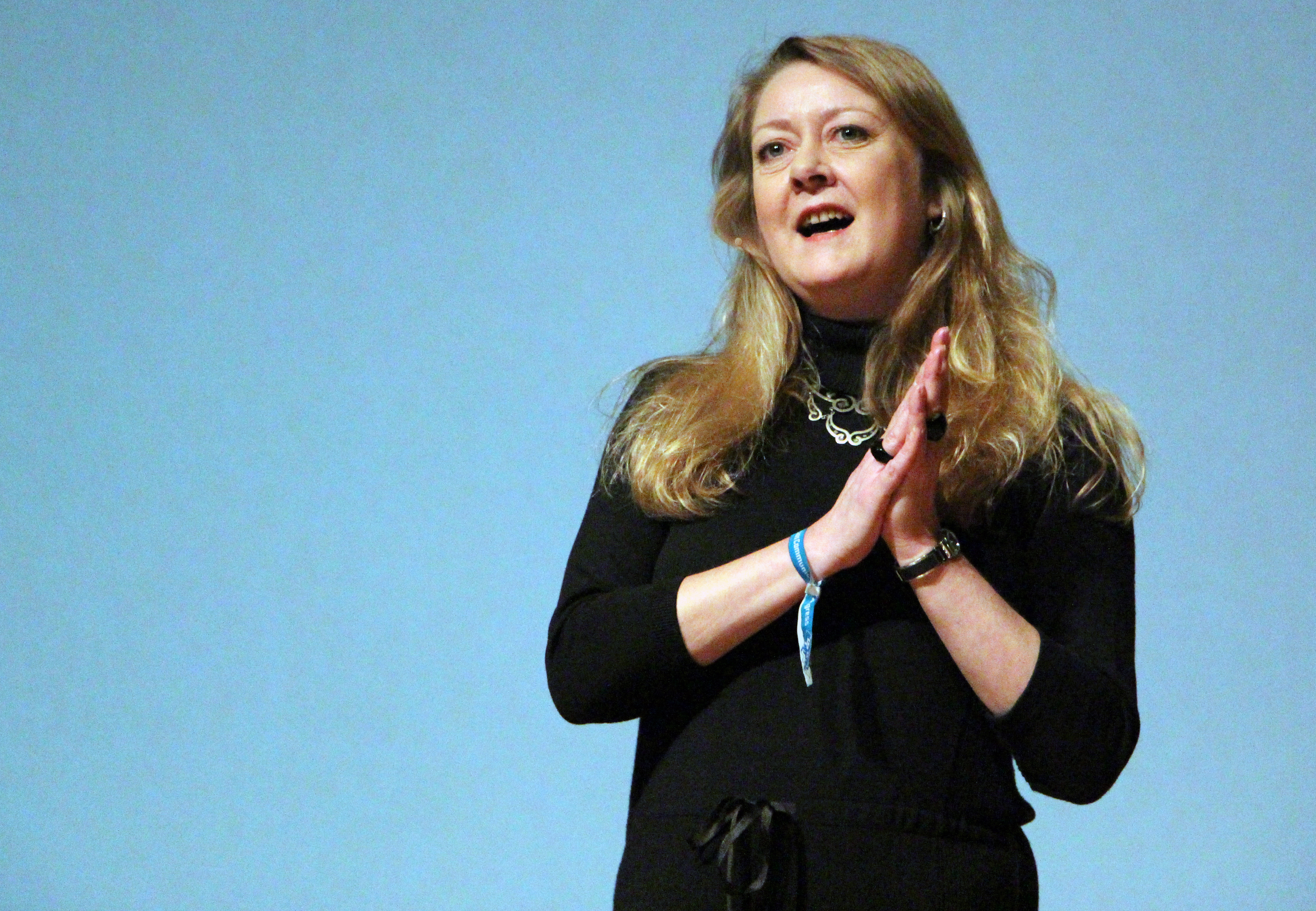 30C3: Annie Machon im Hamburger CCH